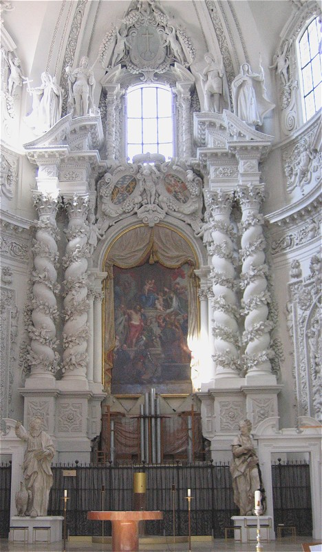 Theatinerkirche in Muenchen, Hauptaltar